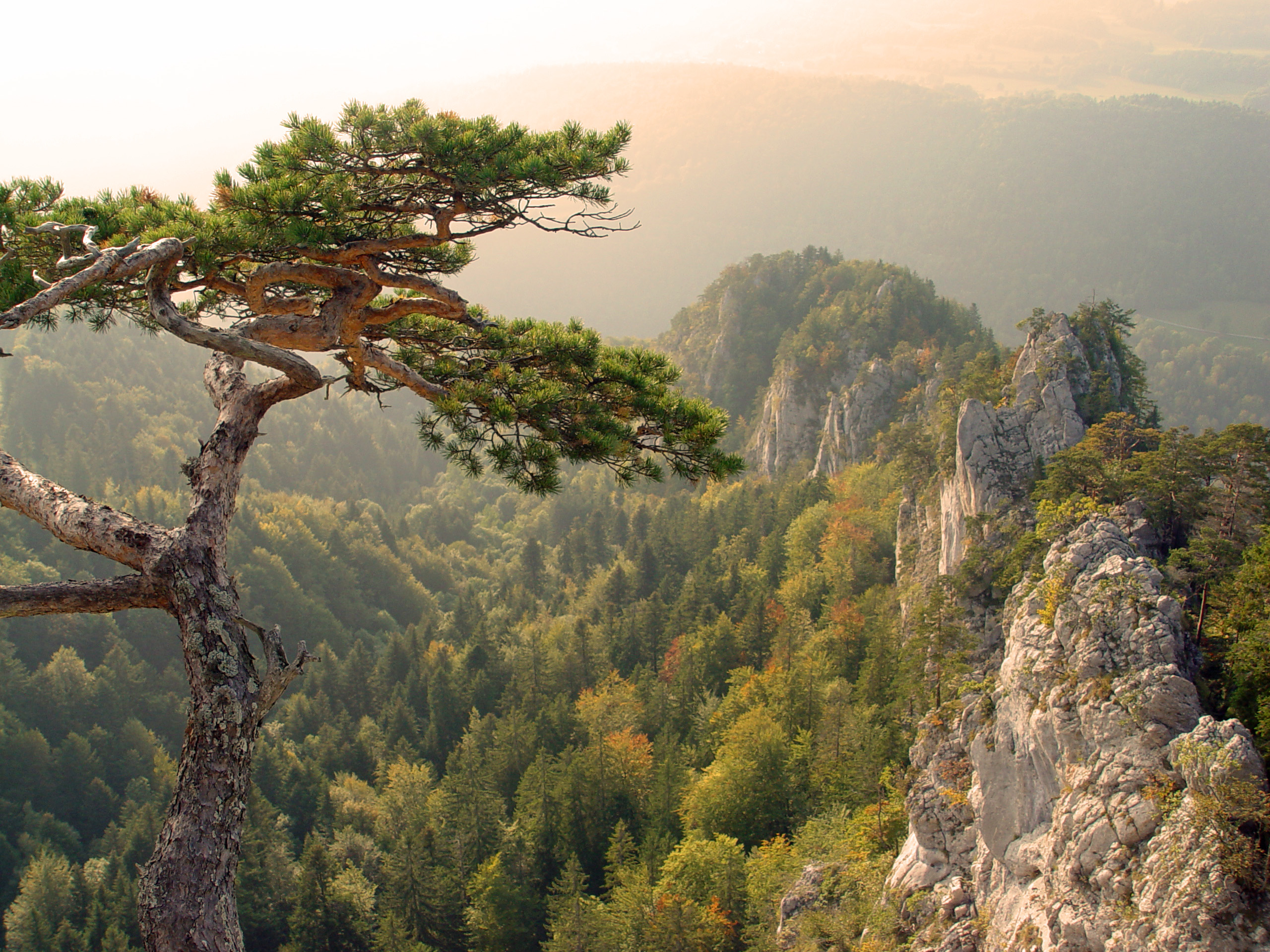 Felsgrat in der Nähe der Ruine Spiegelberg bei Muriaux